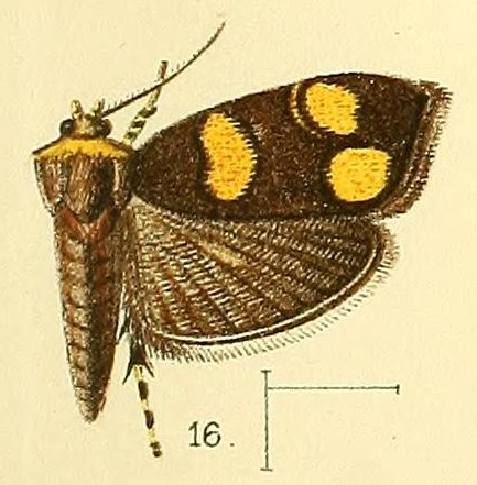 Choreutis flavimaculata